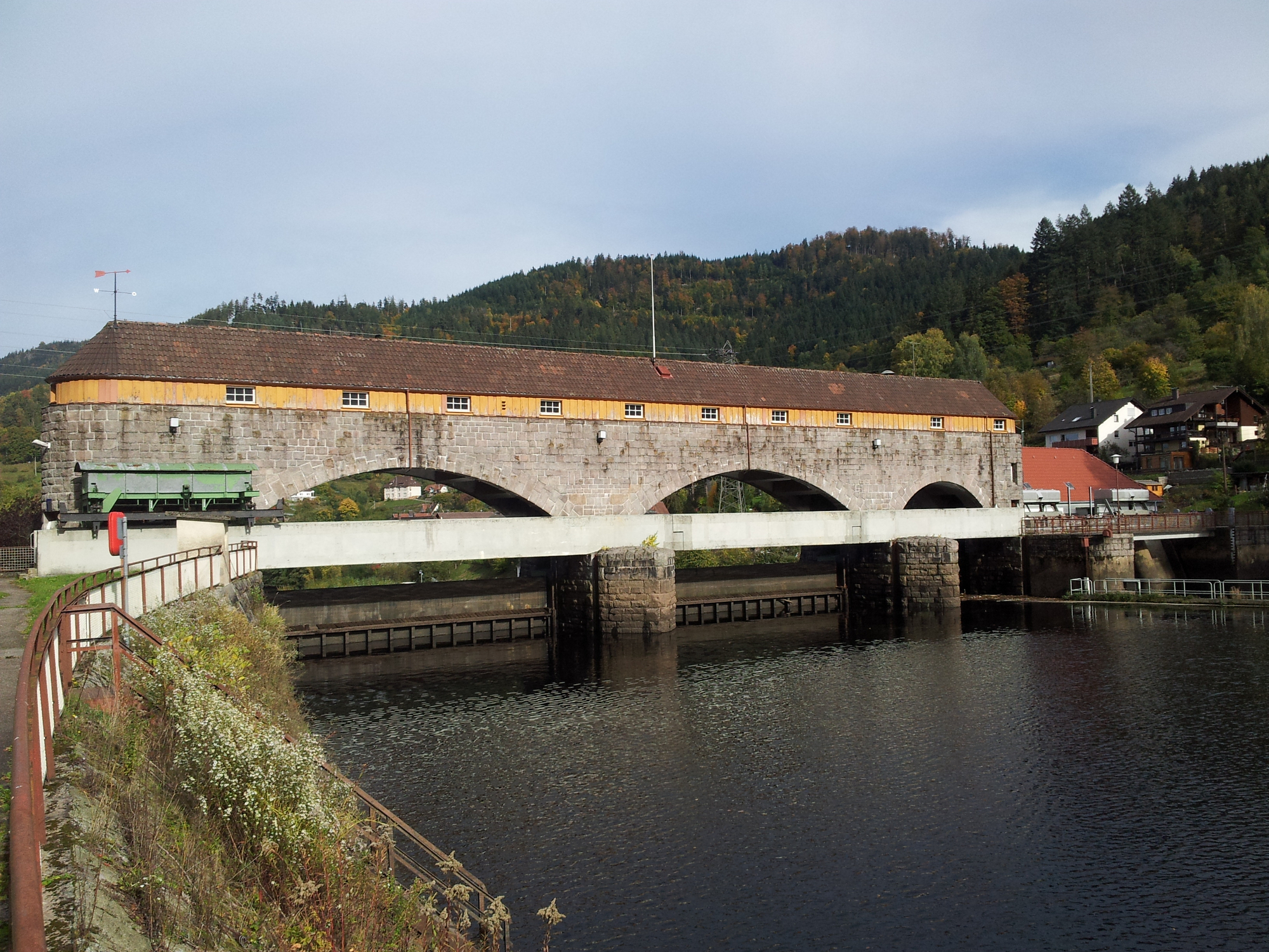 Ausgleichsbecken Forbach Staumauer, Rudolf Fettweis Werk